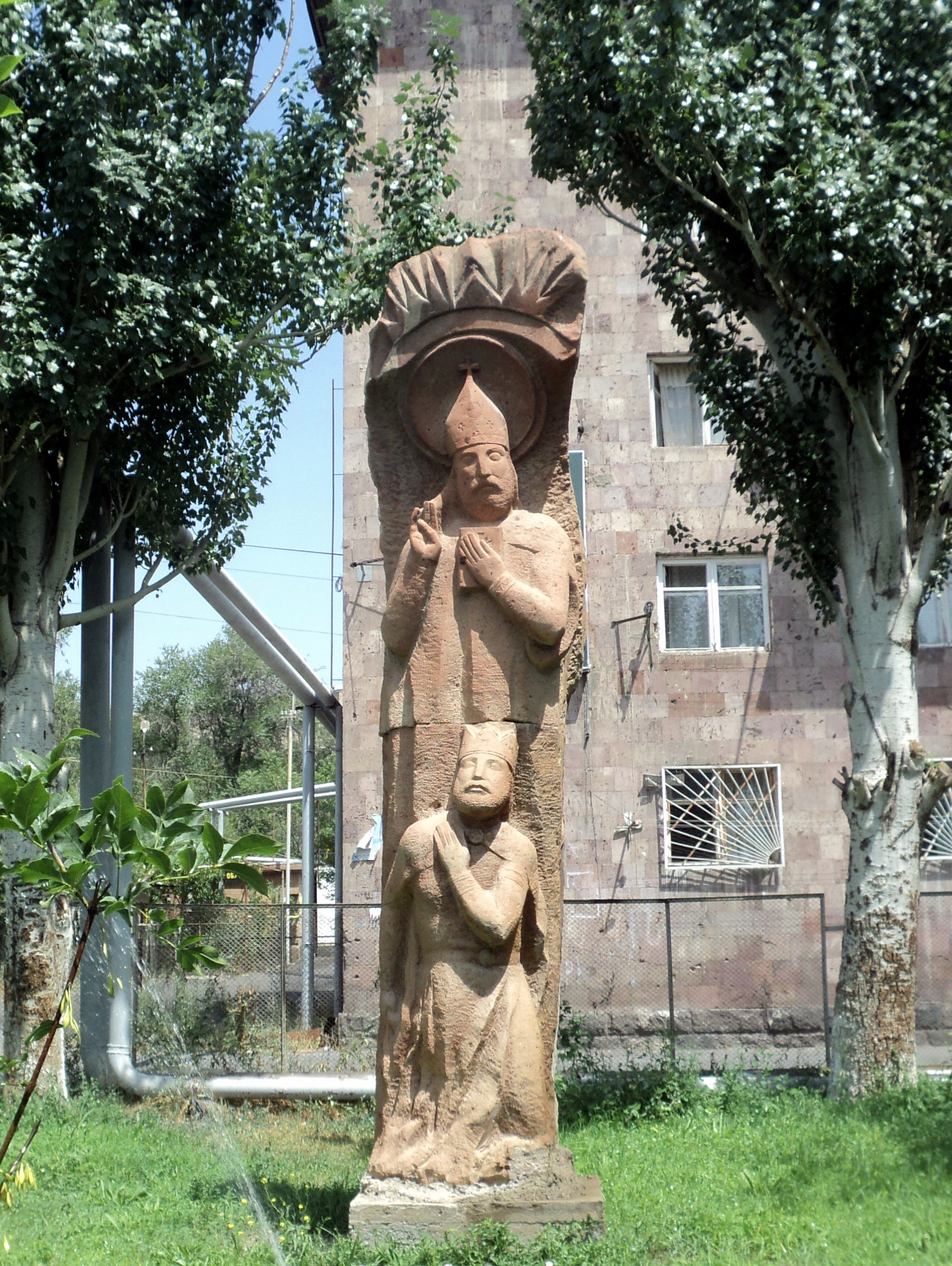 Տրդատի մկրտությունը Գրիգոր Լուսավորչի կողմից Քանդակագործ՝ Յու. Սամվելյան Տուֆ , 2003թ. Քաղաքային սիմպոզիում նվիրված Քրիստոնեության 1700 ամյաին Քանաքեռ-Զեյթուն վարչական շրջան 12/3